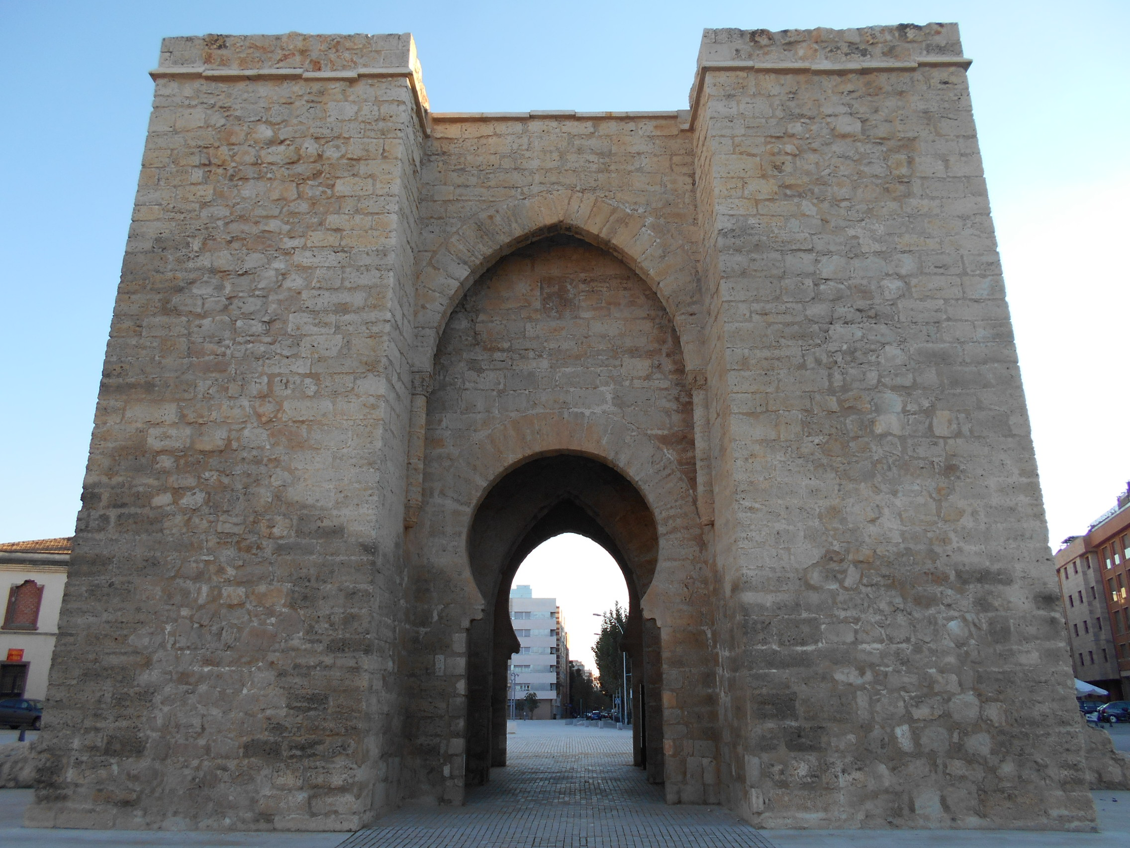 Erigida en 1328 por Alfonso XI, Rey de Castilla. Su fábrica es de mampostería en los lienzos y sillares y caliza en los arcos (Selecciones del Reader's Digest).